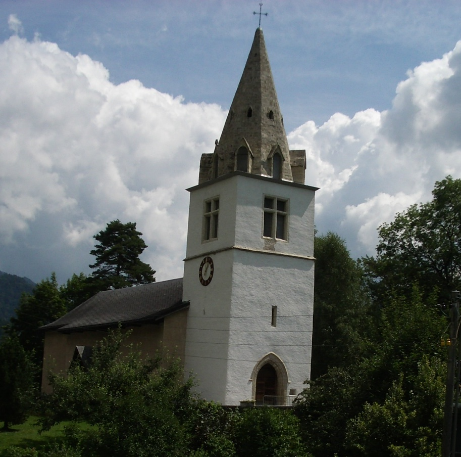 Cergnat VD, Switzerland self-made, August 2006